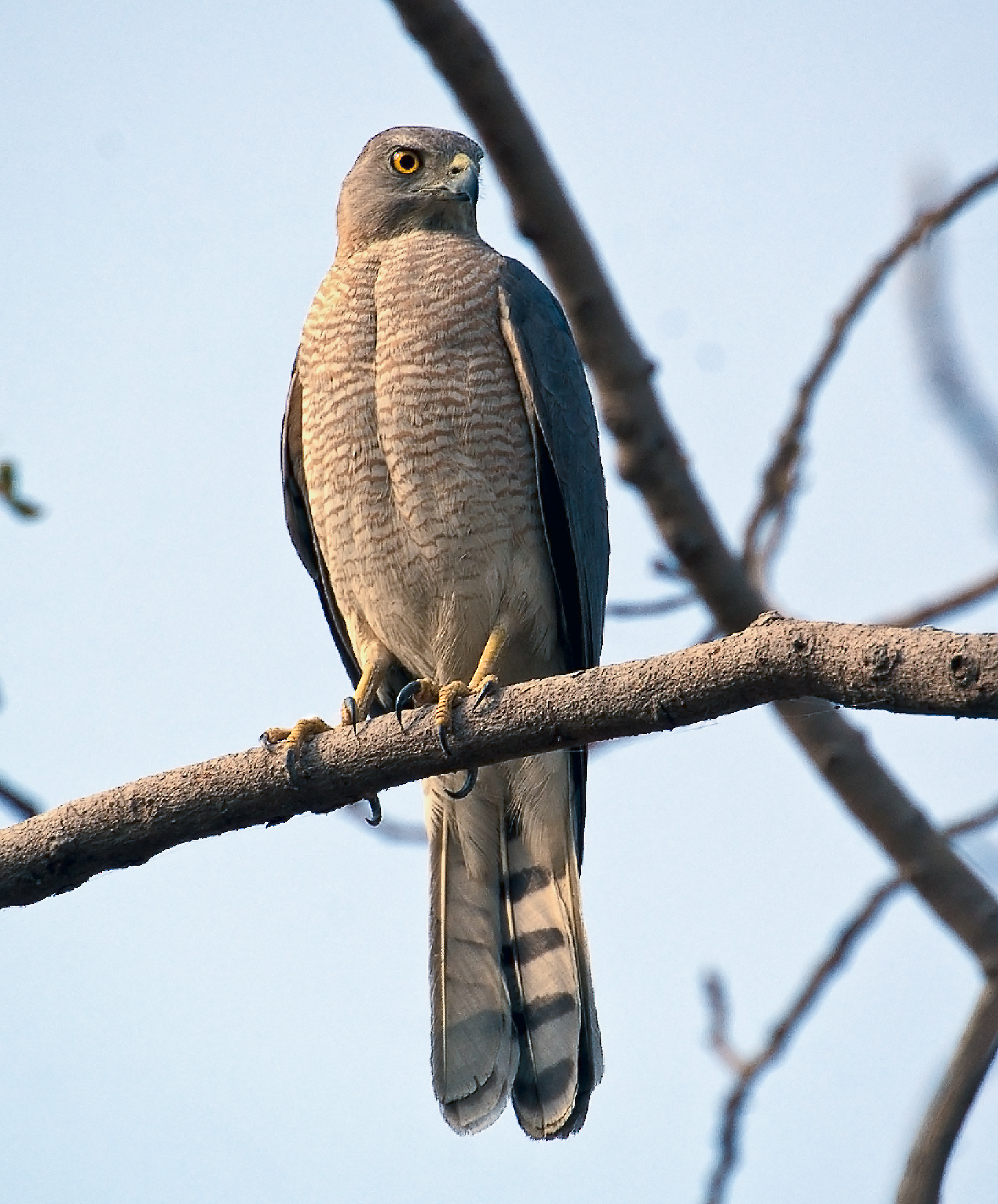 Shikra Accipiter badius (Male)